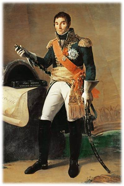 André Masséna (1758-1817) Maréchal de France